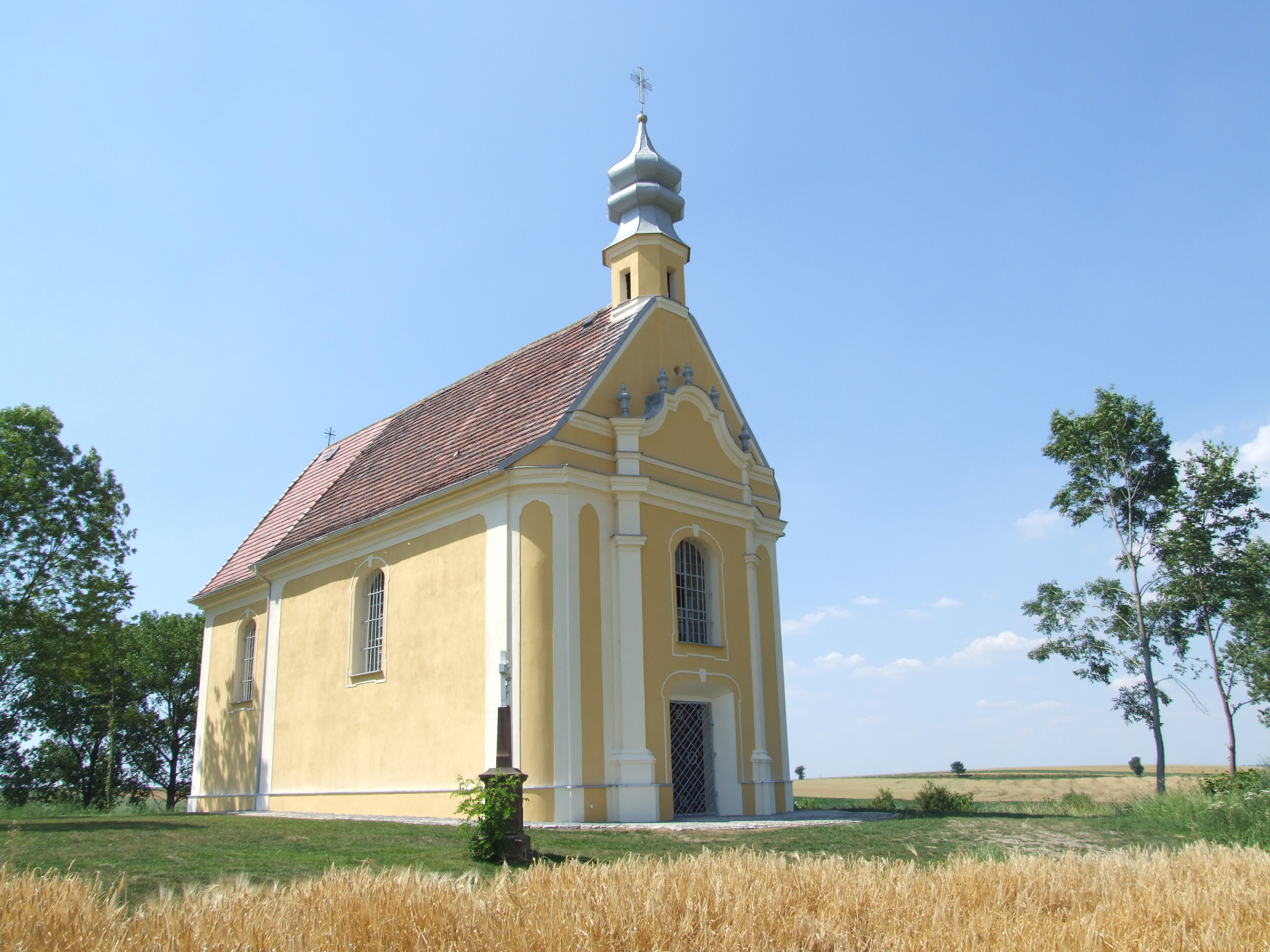 kaplica p.w. Najśw. Panny Marii (na „Glinianej Górce”), 1781, 1950 Głogówek, Głogówek 10.1959.